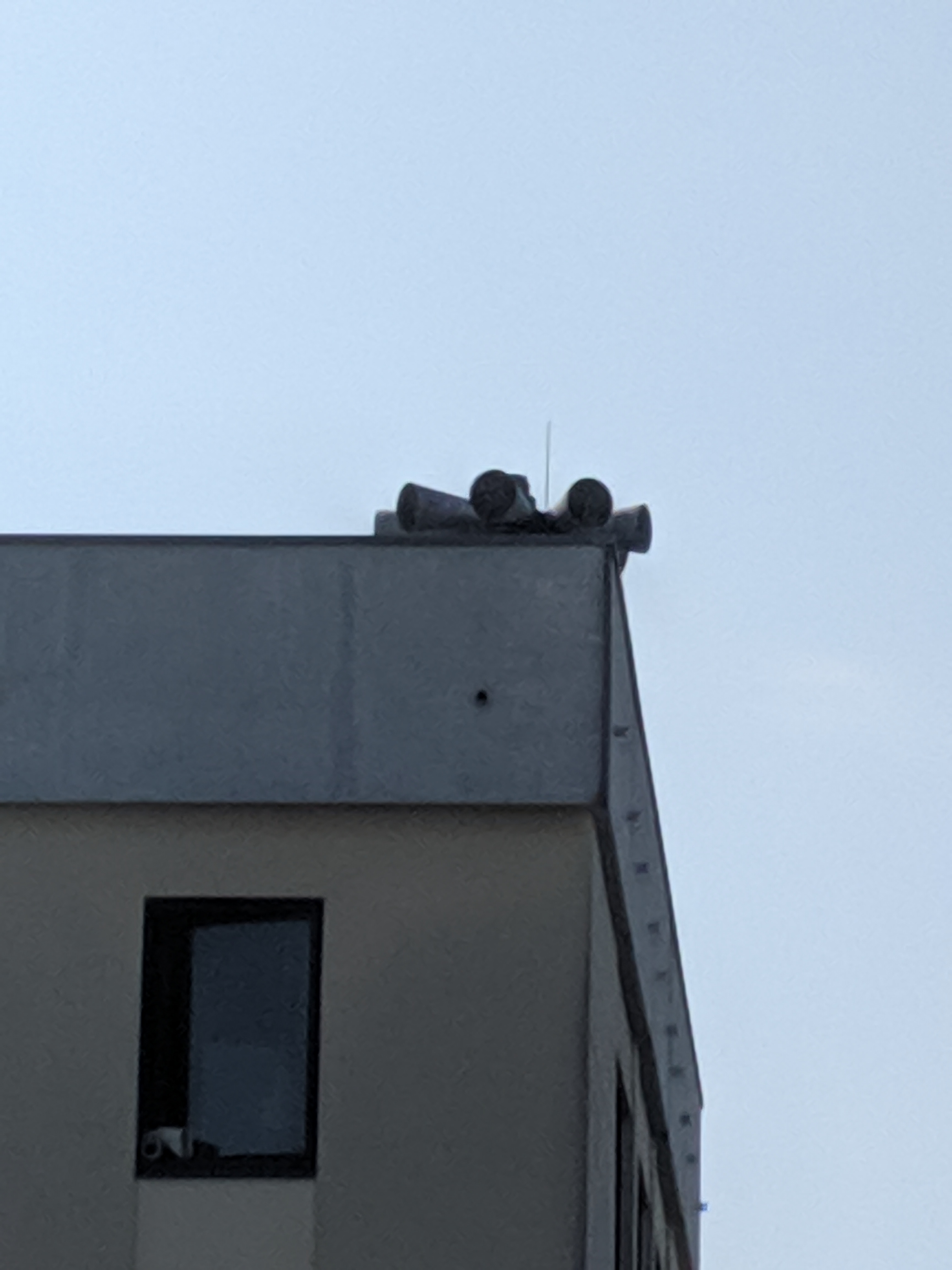 Sirène d'alarme nucléaire de Stiring-Wendel (Moselle)